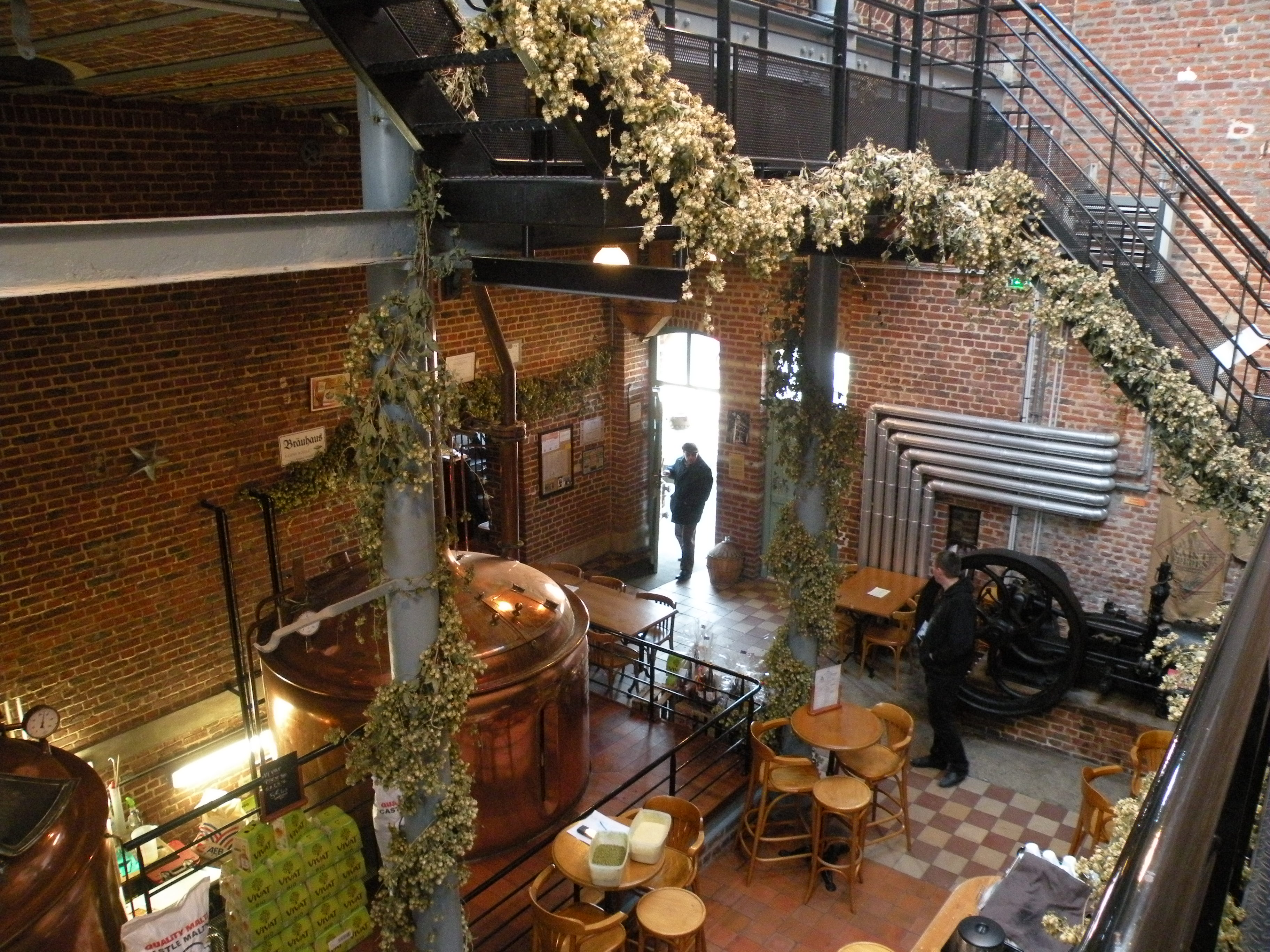 Ancienne brasserie (Le Cateau Cambrésis)